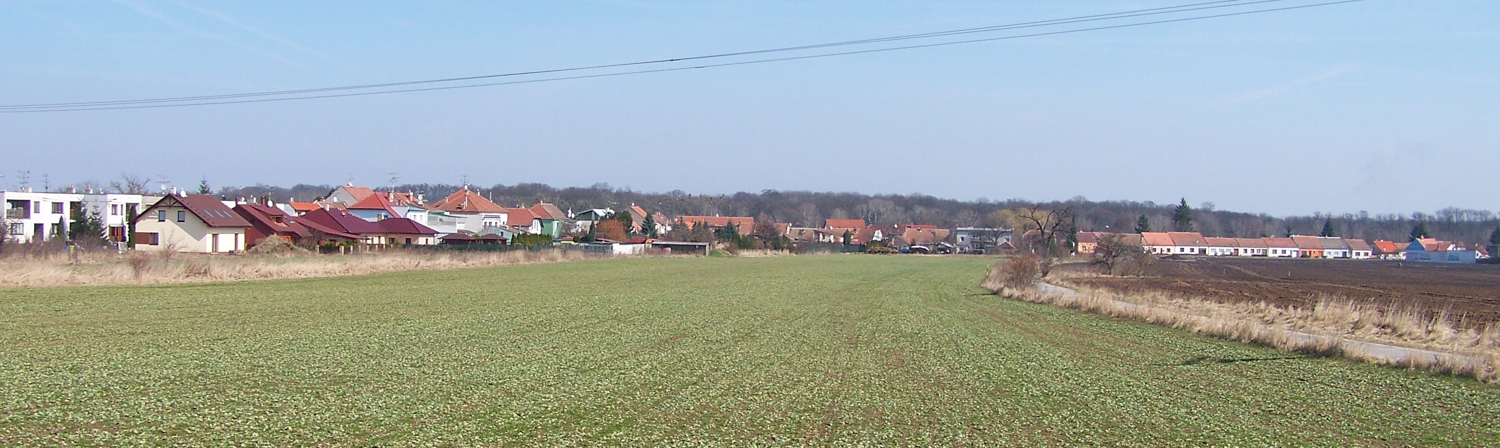 Charvatska Nova Ves ( Breclav )